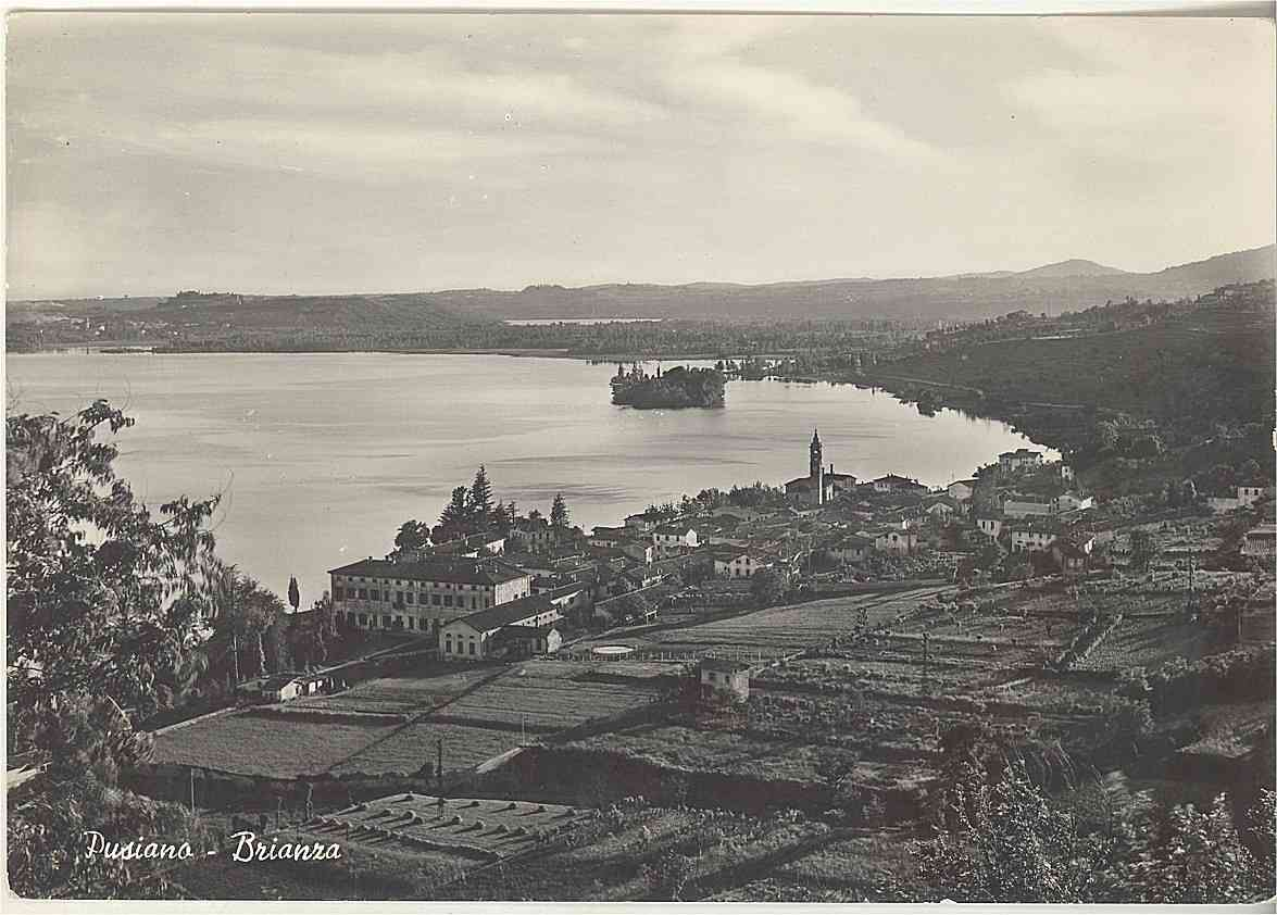 CO Pusiano - Brianza - lago di Pusiano